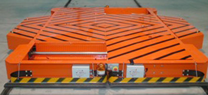 AGV para grandes cargas